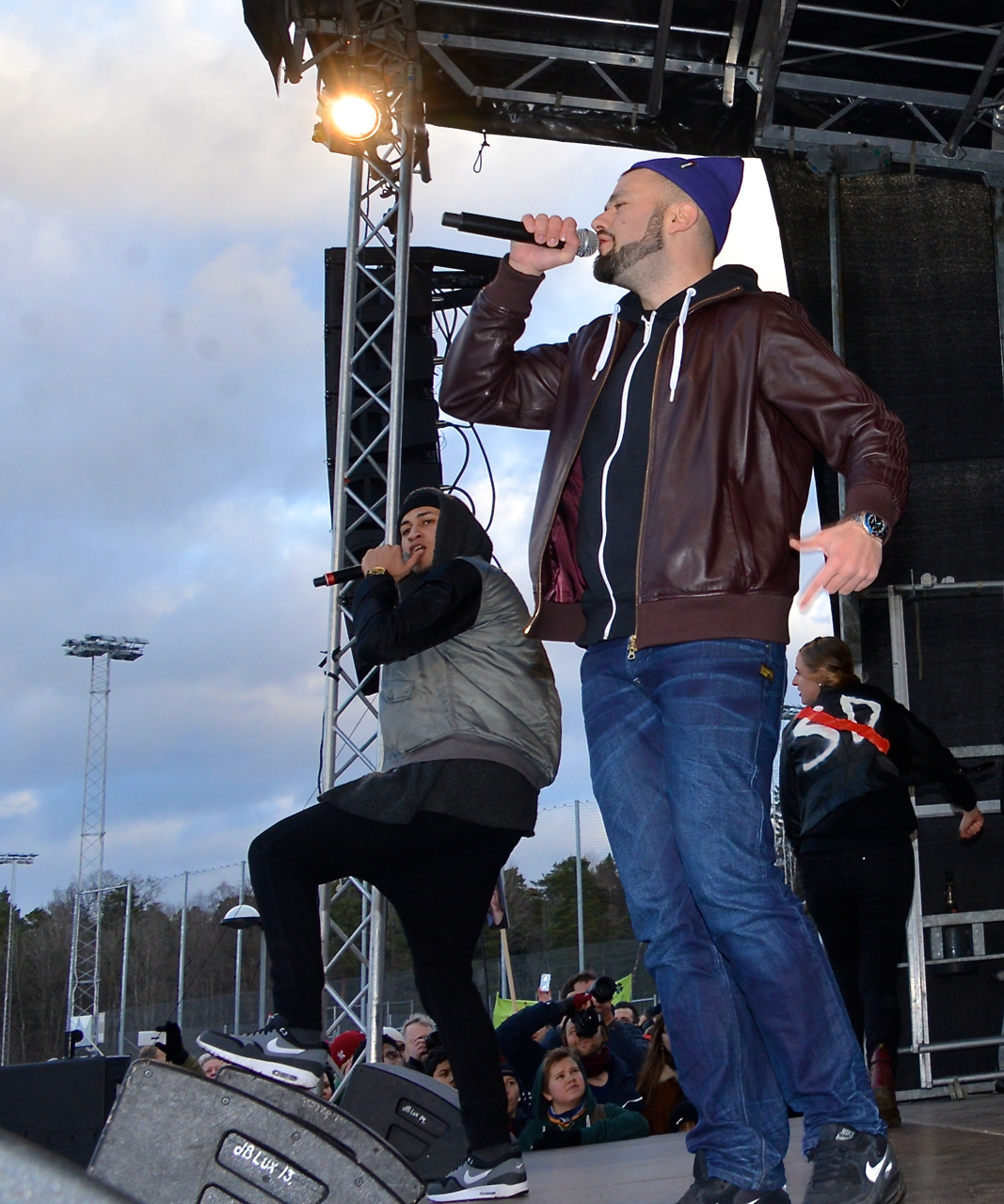 Demonstration för mångfald, mot rasism och fascism anordnad av Linje 17 i Kärrtorp 22 december 2013. Till höger: Aleks i Highwon.